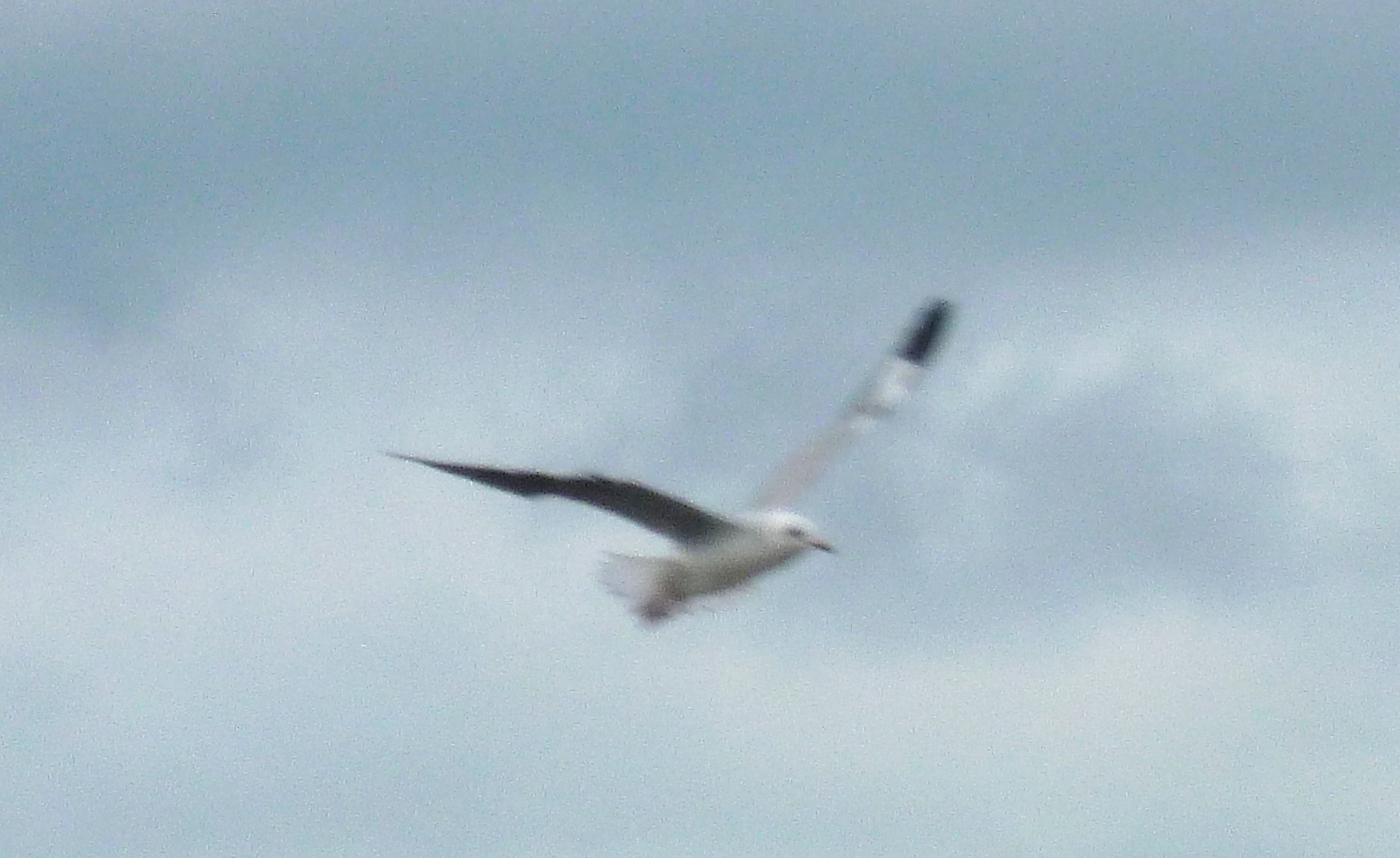 Gaviota en el aire en los Bañados del Rio Dulce y Laguna Mar Chiquita(Reserva Provincial de Cordoba-Argentina_Declarada sitio Ramsar